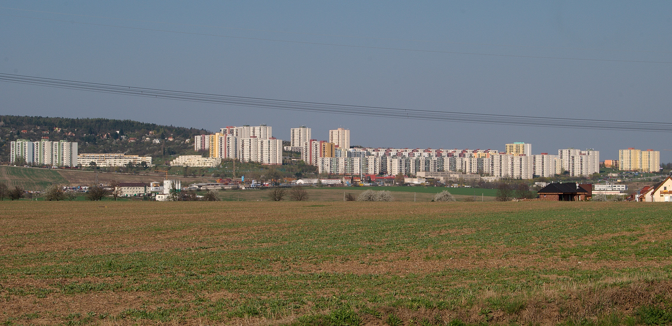 Brno-Nový Lískovec - sídliště Kamenný Vrch vyfotografované od jihozápadu z okraje pole při severozápadní straně silniční křižovatky mezi obcemi Ostopovice, Troubsko a Střelice